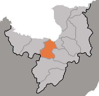 Map of Samsu, Ryanggang-do, DPRK, 2006